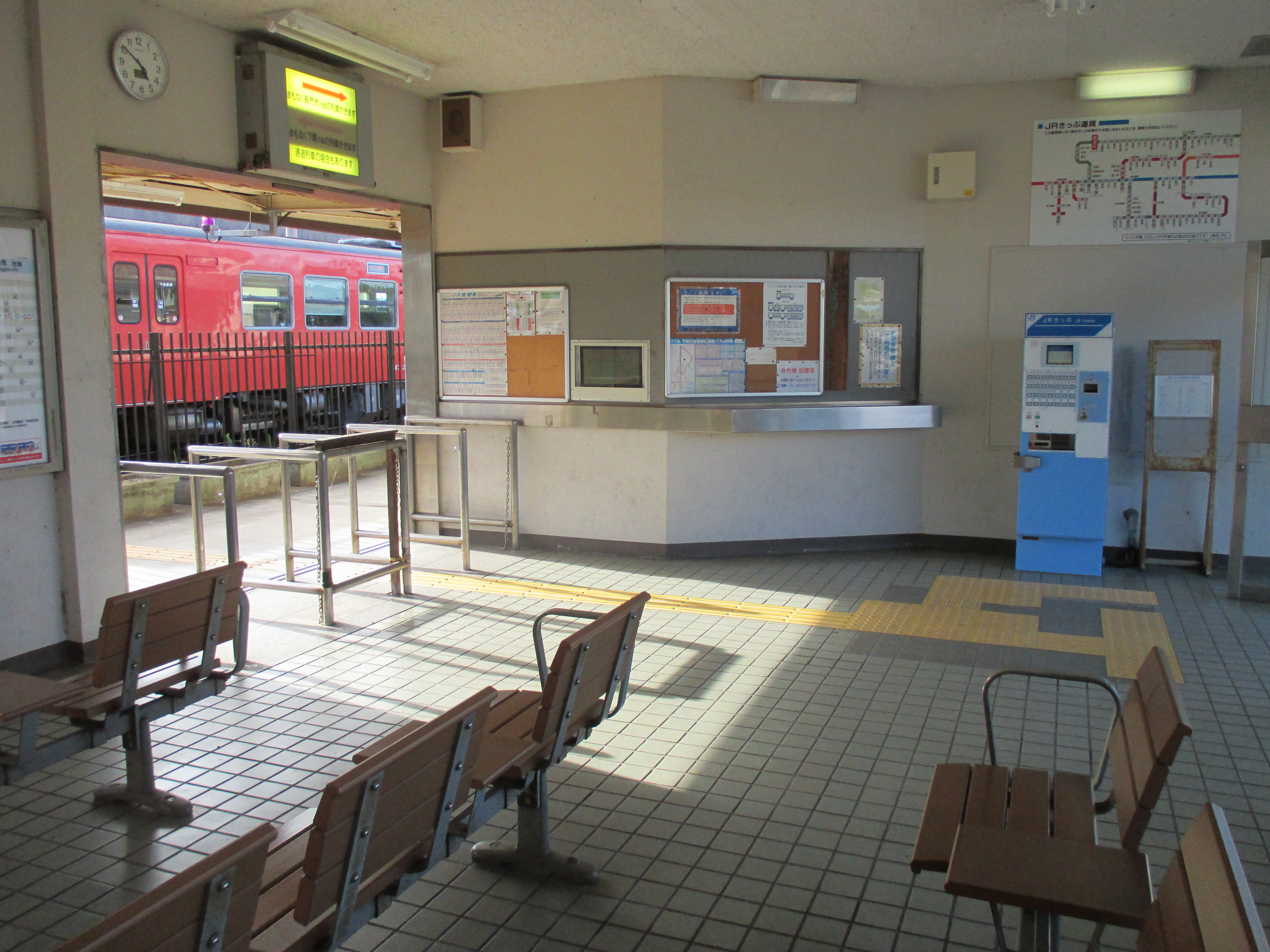 黒井村駅 駅舎内部